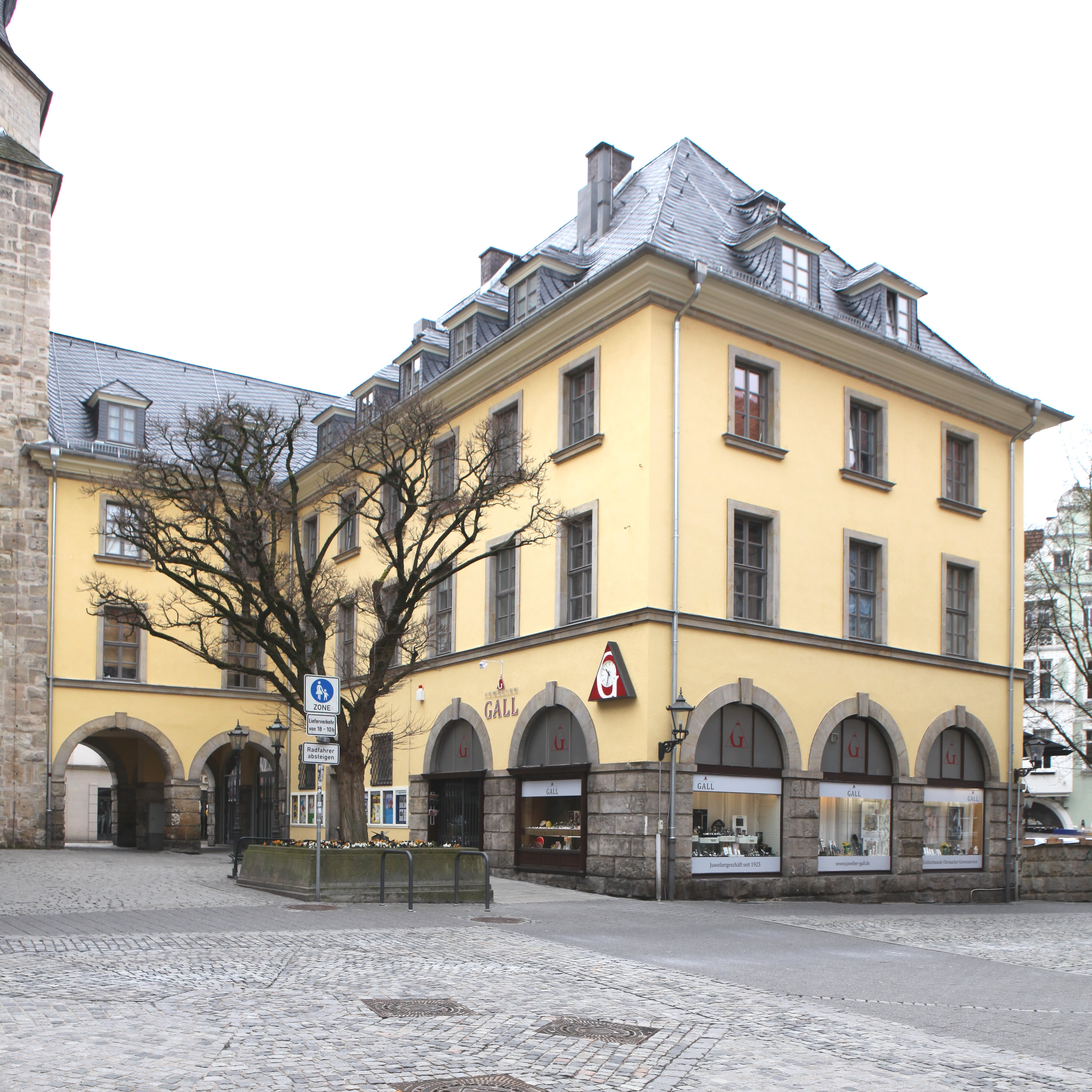 Coburg Steinweg 1, Gräfsblock